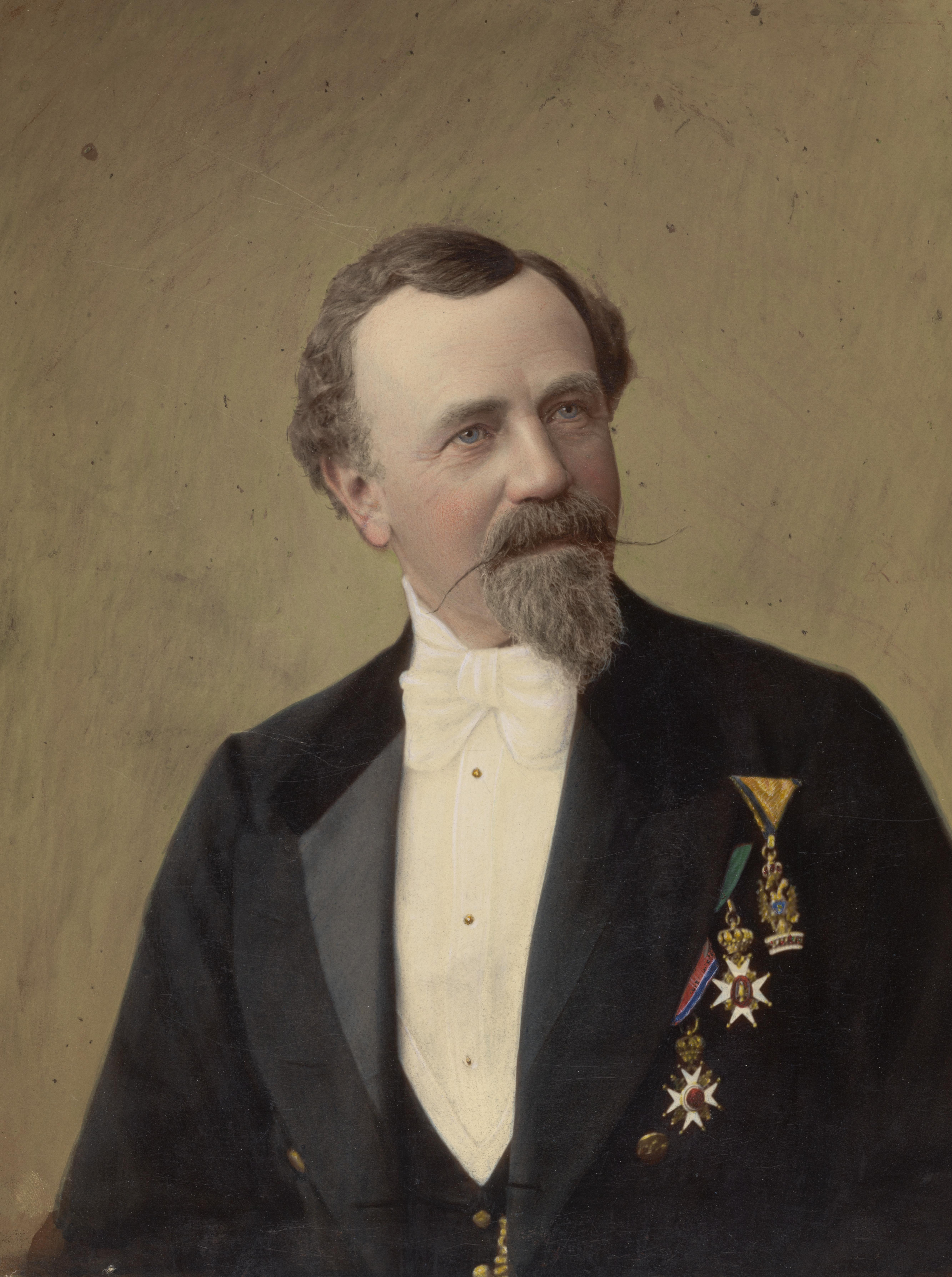 Bildet er hentet fra Nasjonalbibliotekets bildesamling. Peter Petersen (1821–1896), norsk forretningsmann. Ledende handelsmann i Oslo, direktør for Nydalens Compagnie. Tok initiativ til bygningskomplekset Victoria terrasse. Generalkonsul for Østerrike-Ungarn fra 1874. Depicted person: Petersen, Peter